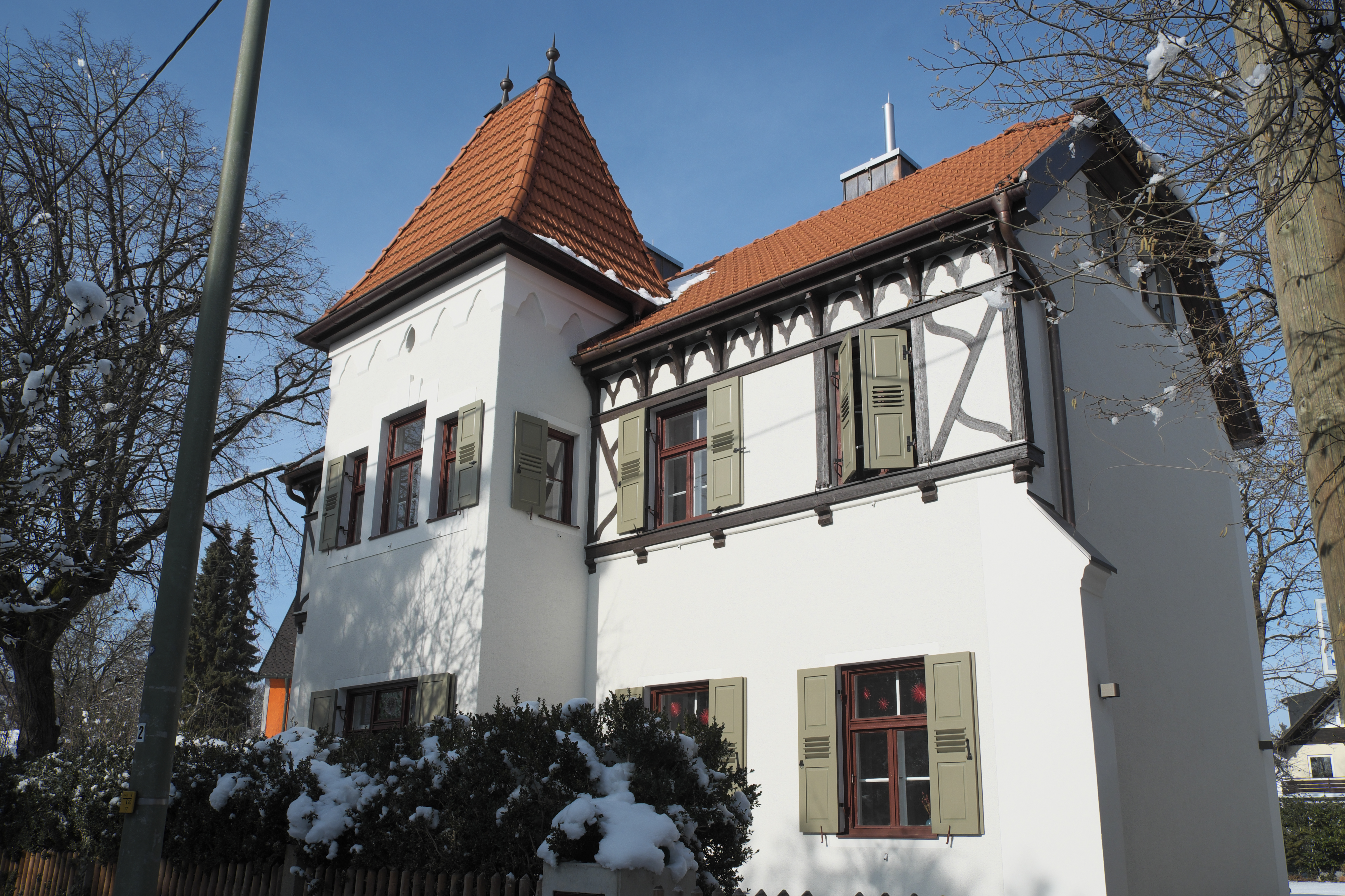 Villa, Hofmillerstraße 34, in Obermenzing im Stadtbezirk Pasing-Obermenzing in München (Bayern/Deutschland), 1900 erbaut, wohl aus dem Büro August Exter.